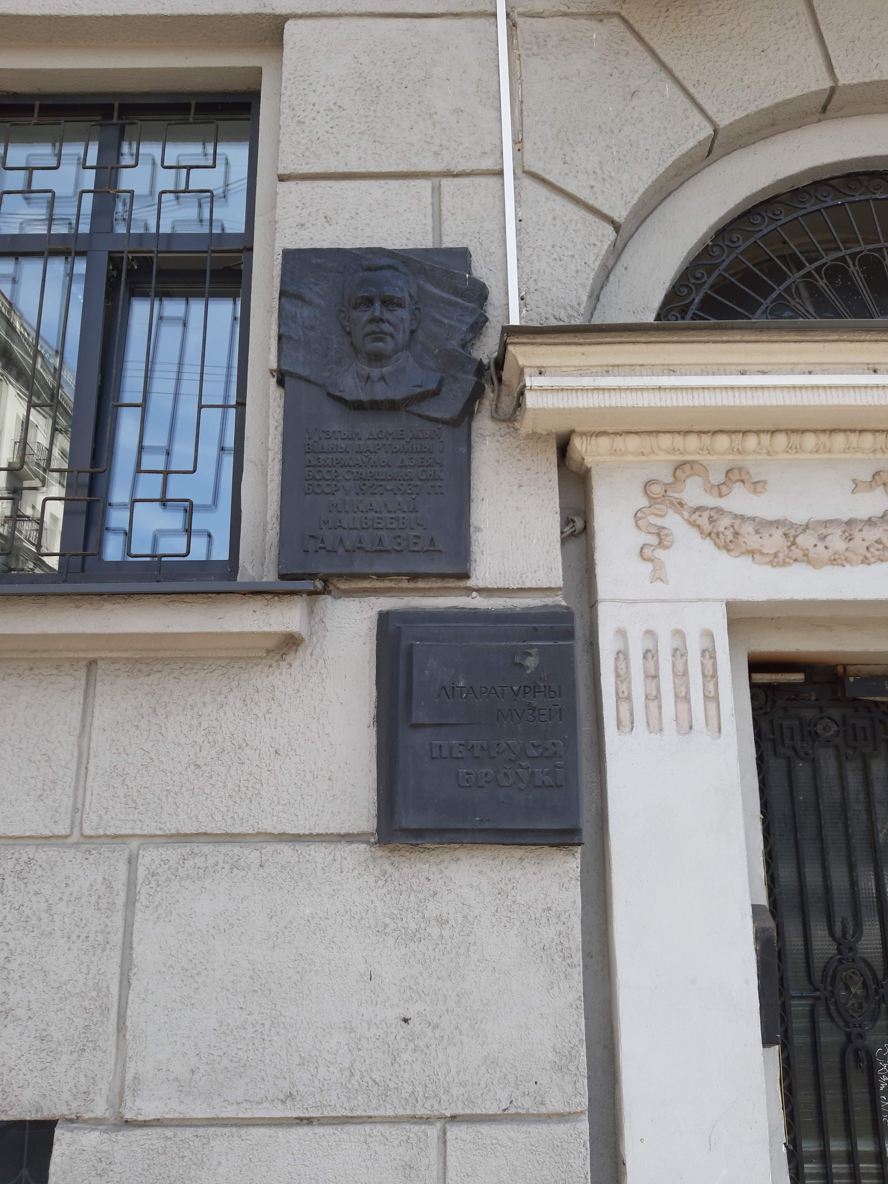 Мінск. Ад пл. Незалежнасці да Залатой Горкі